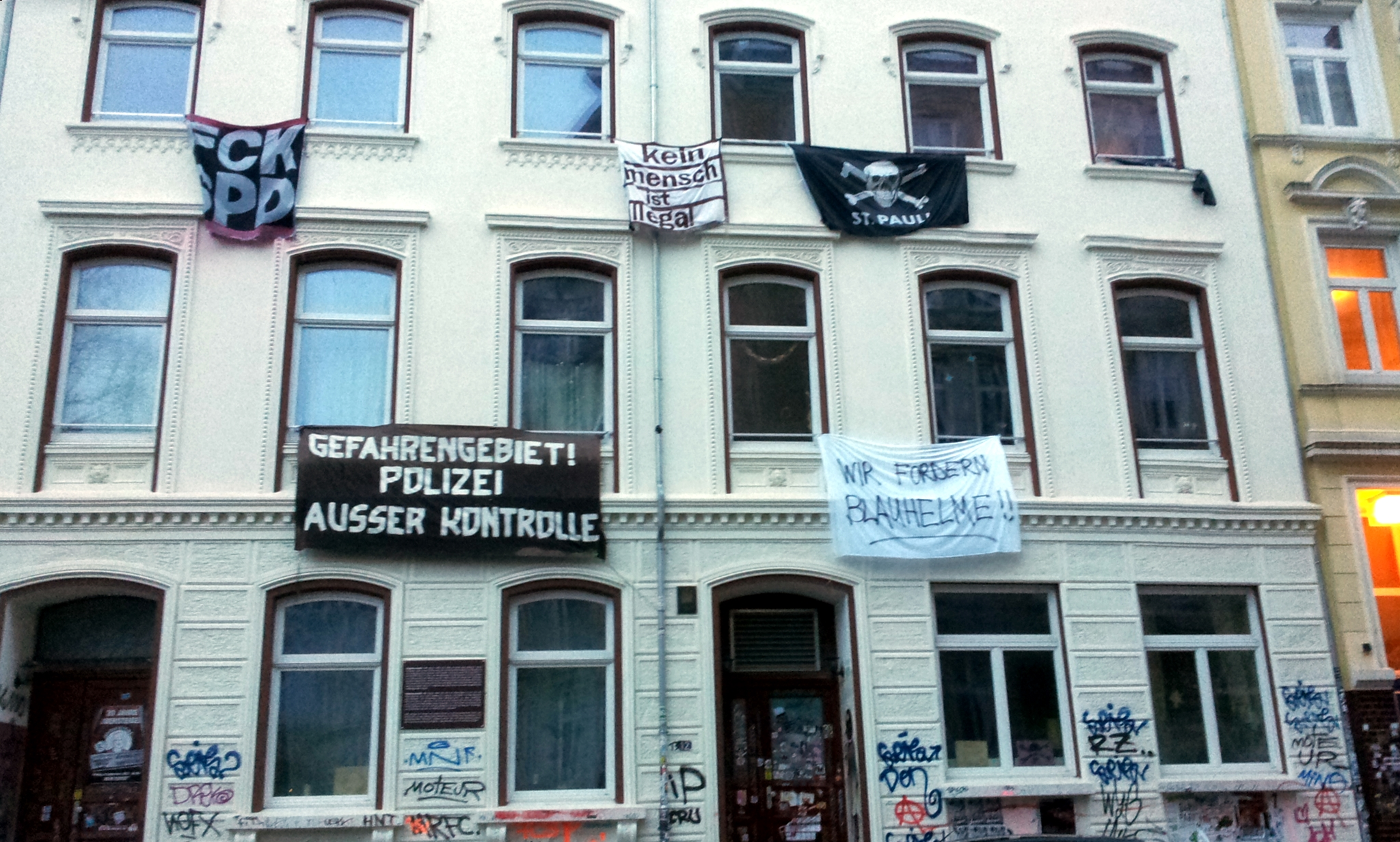 Haus mit Transparenten Proteste von Anwohner gegen die Ausrufung eines Gefahrengebiets in Hamburg St. Pauli im Januar 2014